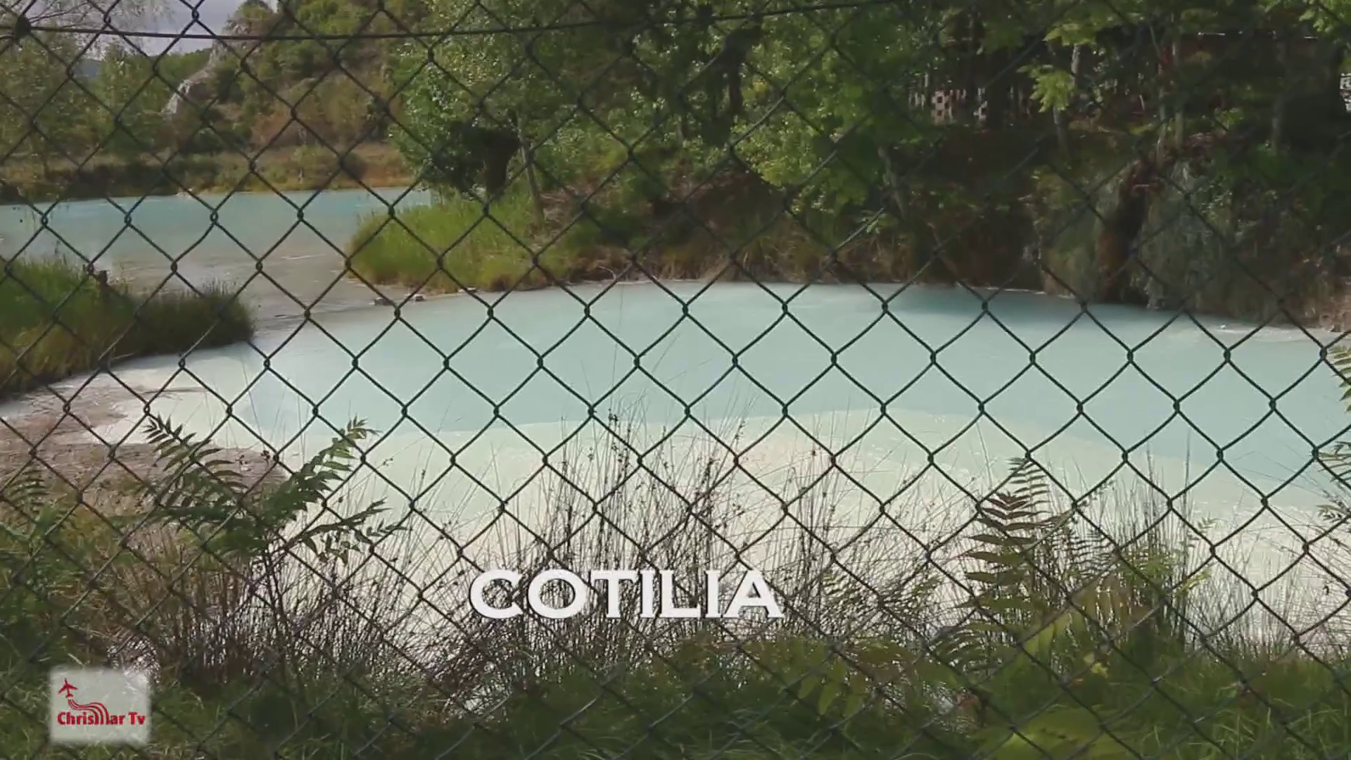 Il villaggio termale di Cotilia, in provincia di Rieti (Lazio)